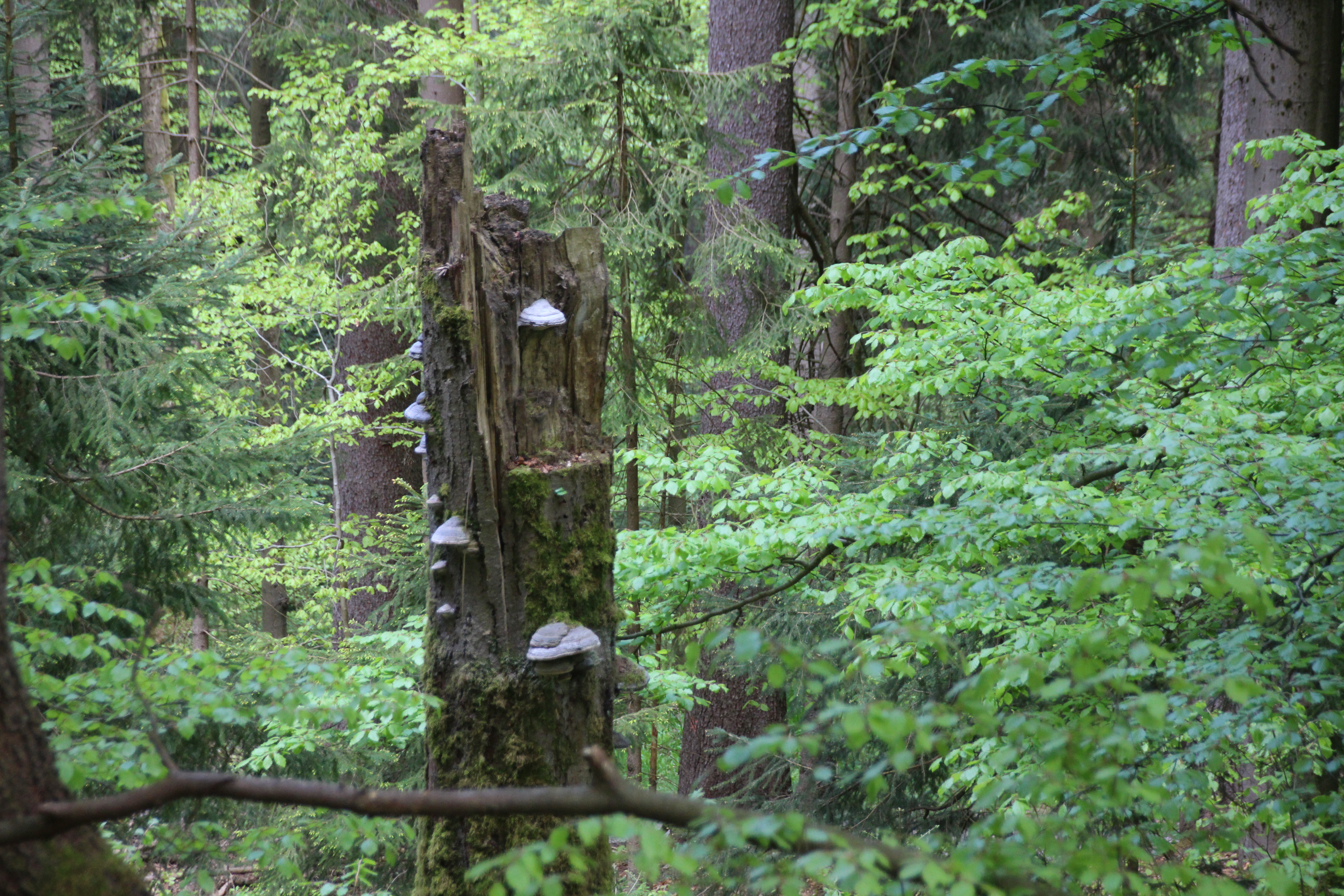 Im Naturschutzgebiet Am Riedert.